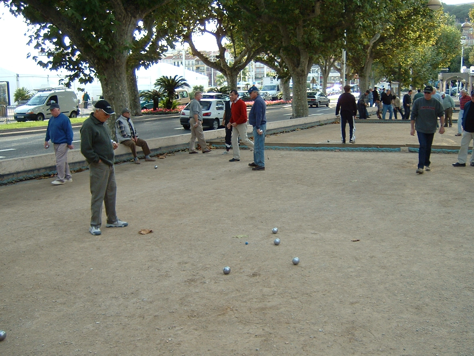 joueurs de pétanque à Cannes (France)